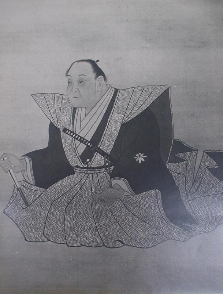 Portrait of Tamano Kyuka (玉乃九華, 1797 – 1851)